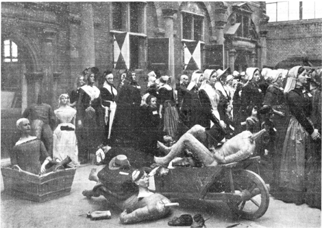 De verzameling van klederdrachten is buiten het Rijksmuseum gebracht om te worden vervoerd naar het Openlucht Museum in Arnhem (1916).